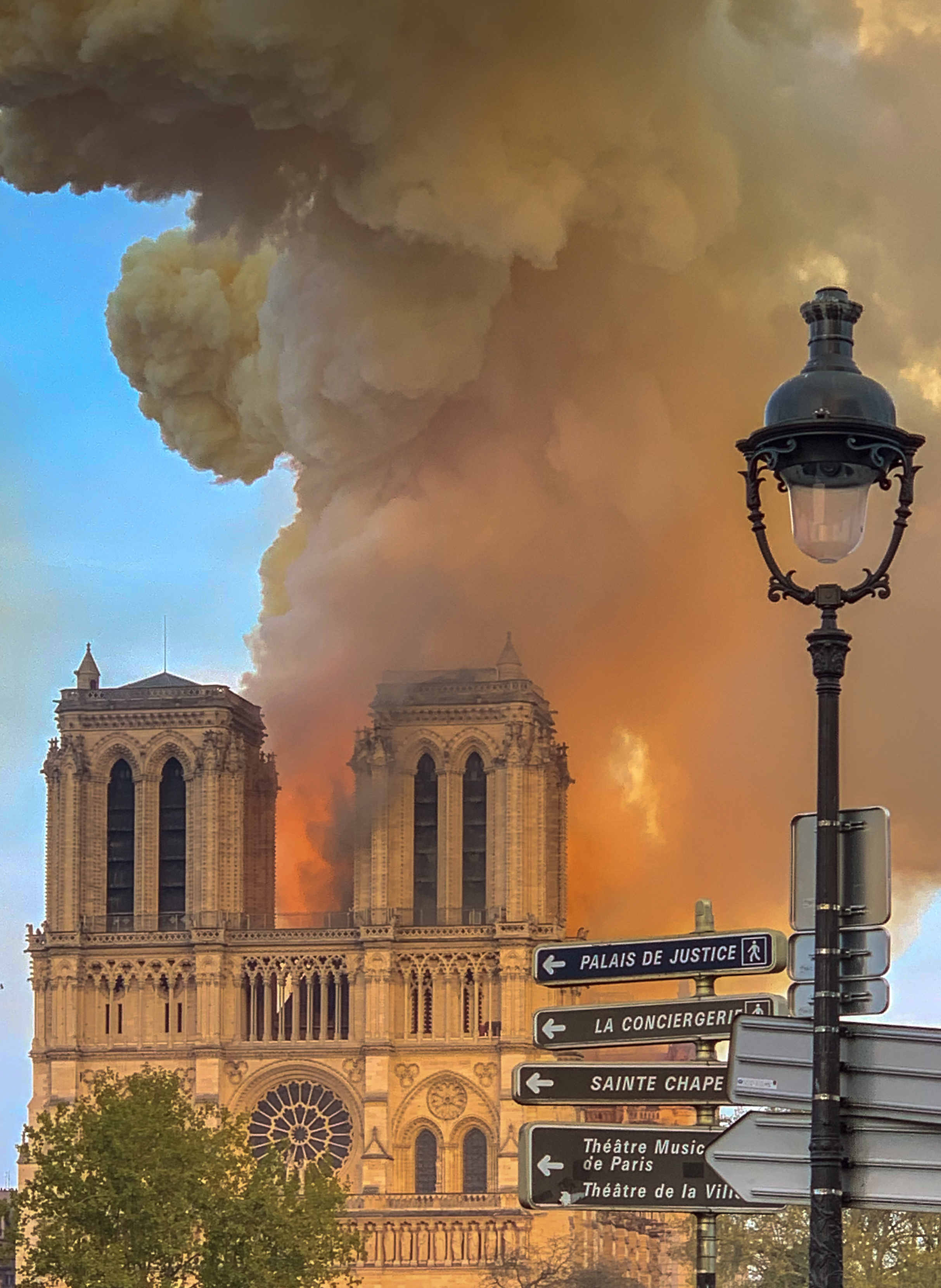 Notre Dame de Paris, brandend. 15 april 2019